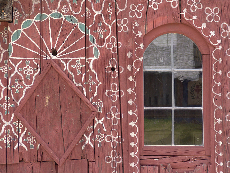 Wallfahrtkapelle Maria vom Guten Rat aus Thierham im Freilichtmuseum Tittling, Bayern, Deutschland.